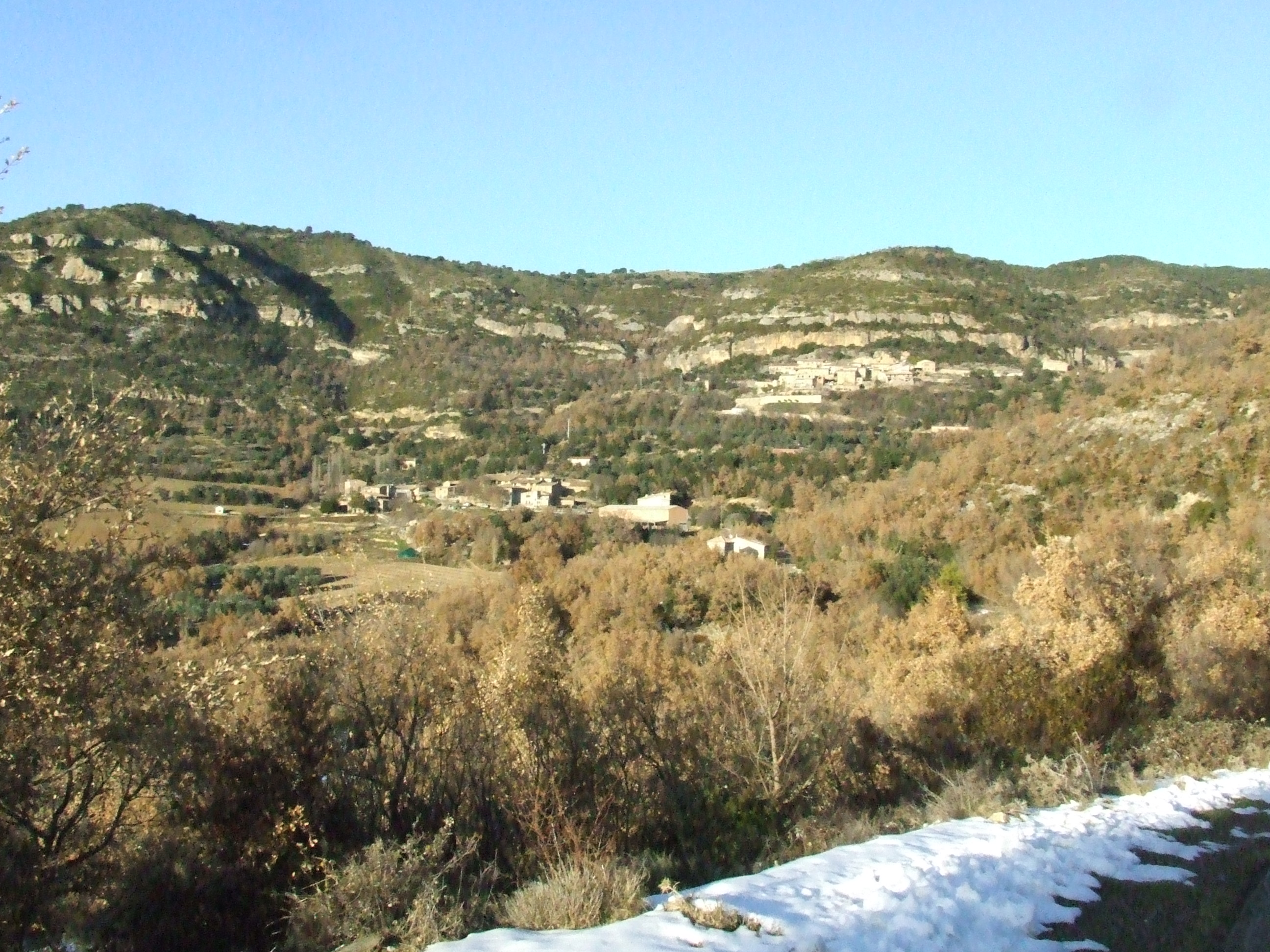 Els pobles de Sant Martí de Barcedana (a baix) i de Sant Miquel de la Vall (al damunt), a la Vall de Barcedana (Aransís, Gavet de la Conca, Pallars Jussà)